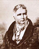 Fürst Anton Radziwill, Antoni Radziwiłł